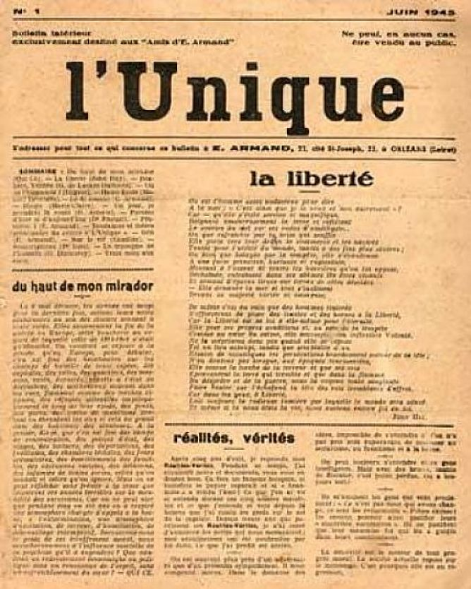 L'Unique est un périodique anarchiste individualiste français éditée par Émile Armand de 1945 à 1956 (n°1 juin 1945).